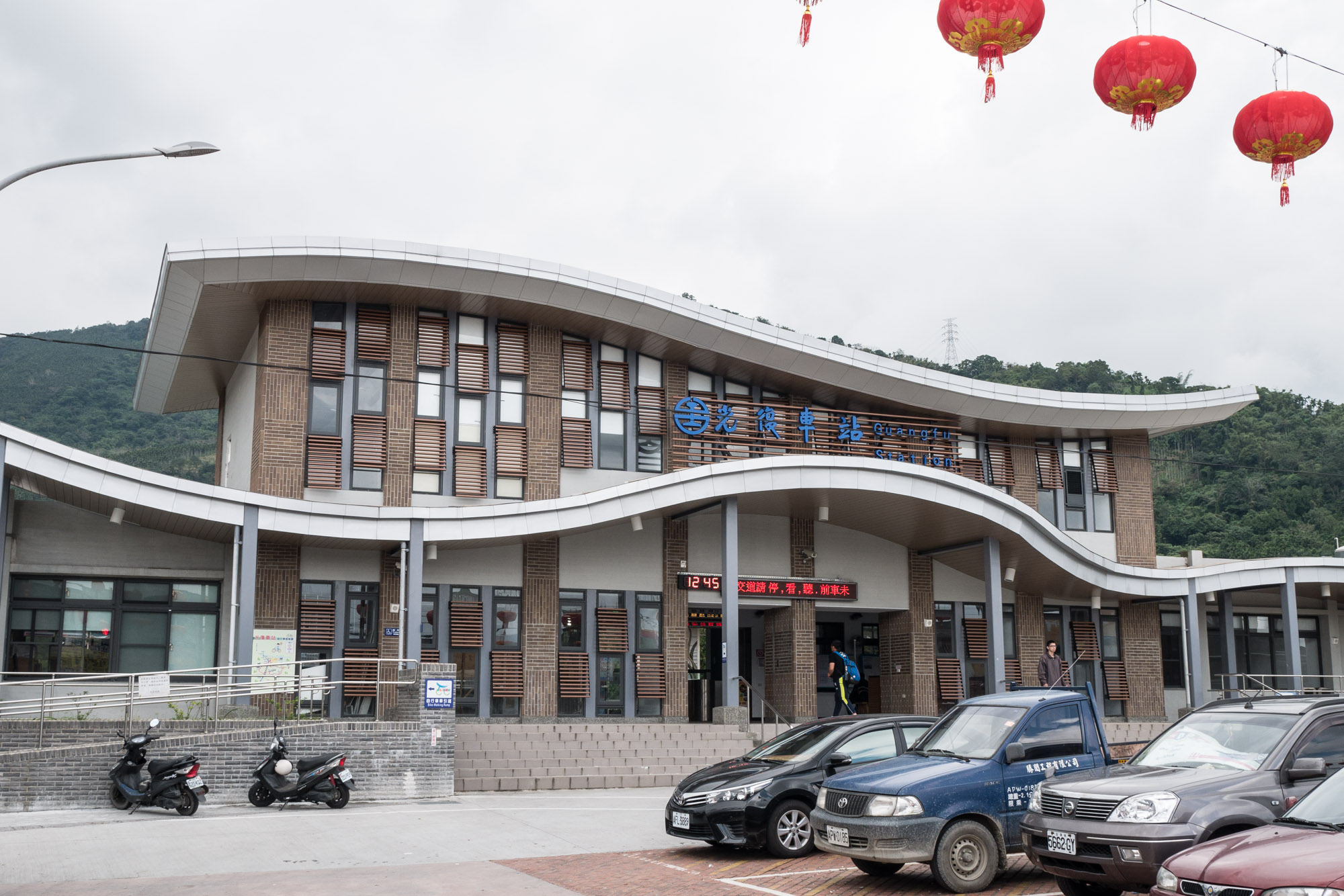 光復車站